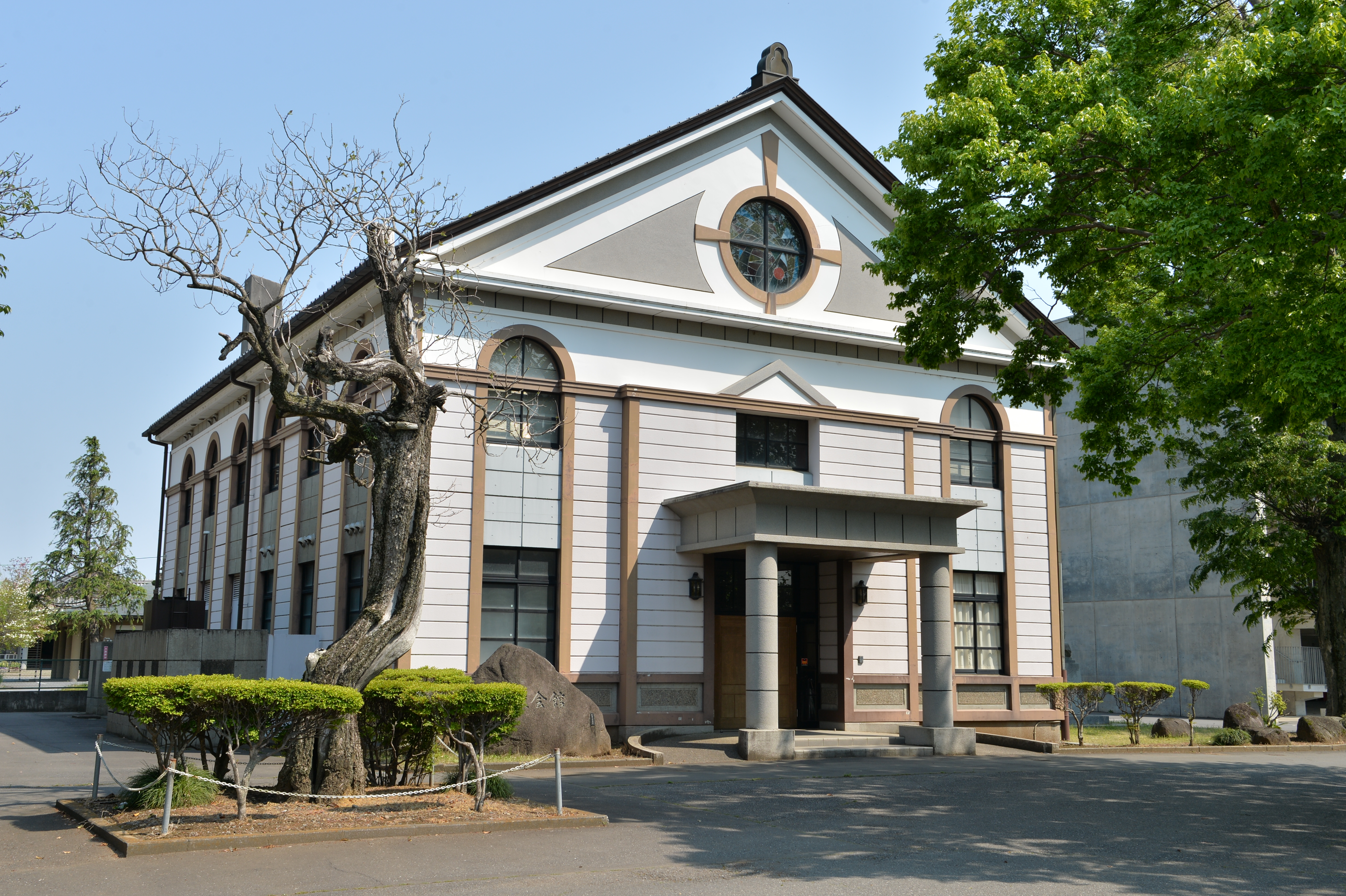 茨城県立水海道第一高等学校の亀陵会館。セミナー室、合宿施設。かつての講堂の外観を模して設計され、創立100周年記念事業の一環として建てられた。